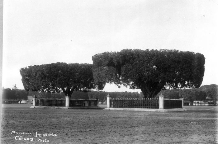 Foto. De aloon-aloon met twee waringin bomen voor de kraton van de sultan van yogyakarta op Midden-Java